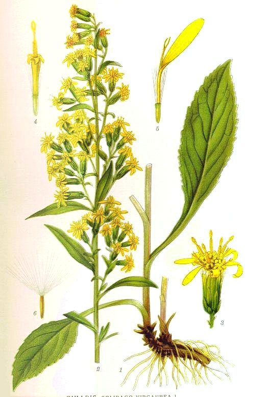 Original Description Gullris, Solidago virgaurea L.